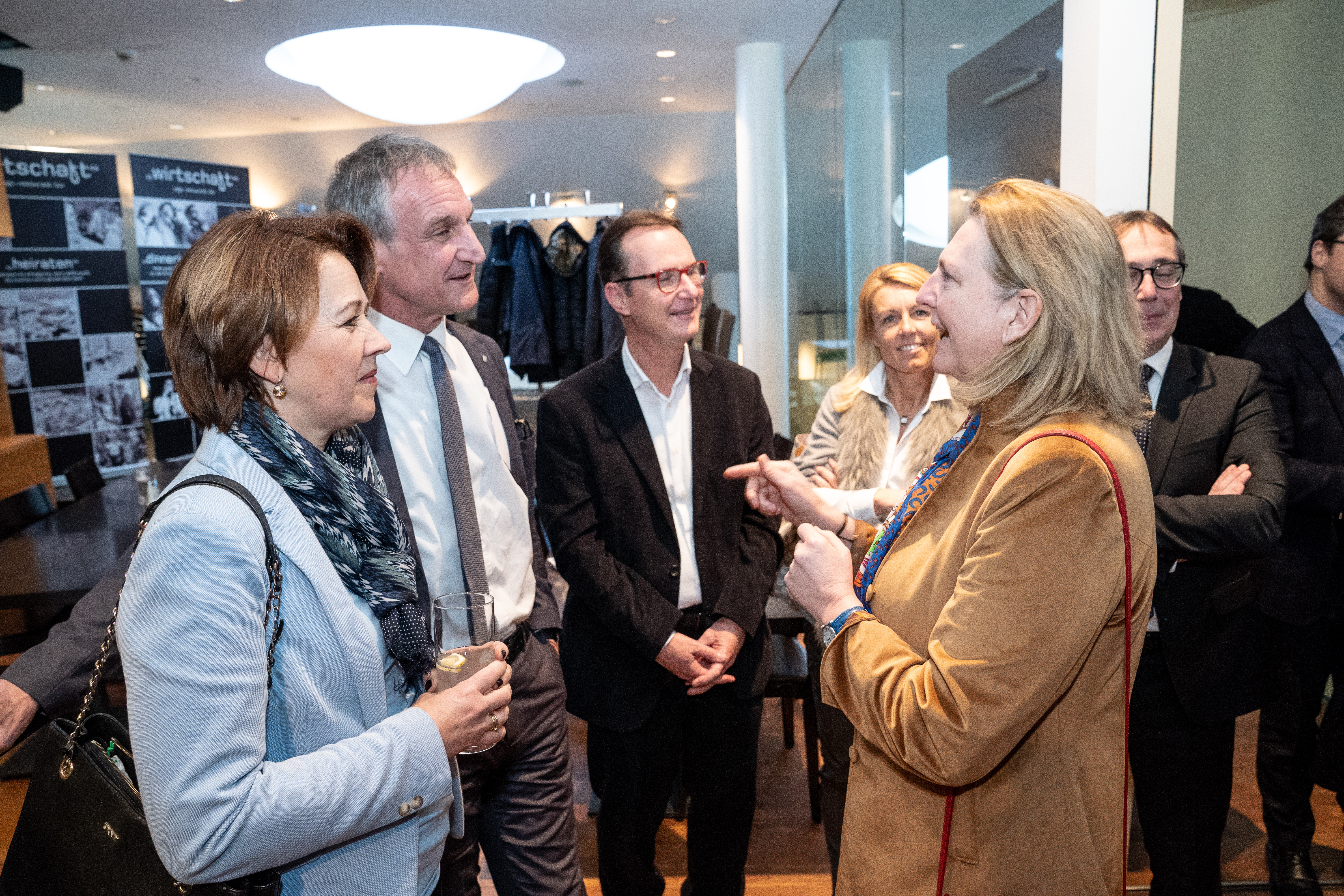 Außenministerin Karin Kneissl im Gespräch mit der Dornbirner Bürgermeisterin Andrea Kaufmann, dem Bregenzer Bürgermeister Markus Linhart und dem Dornbirner Stadtrat Guntram Mäser beim Arbeitsbesuch im Restaurant "wirtschaft" (im WIFI) in Dornbirn.